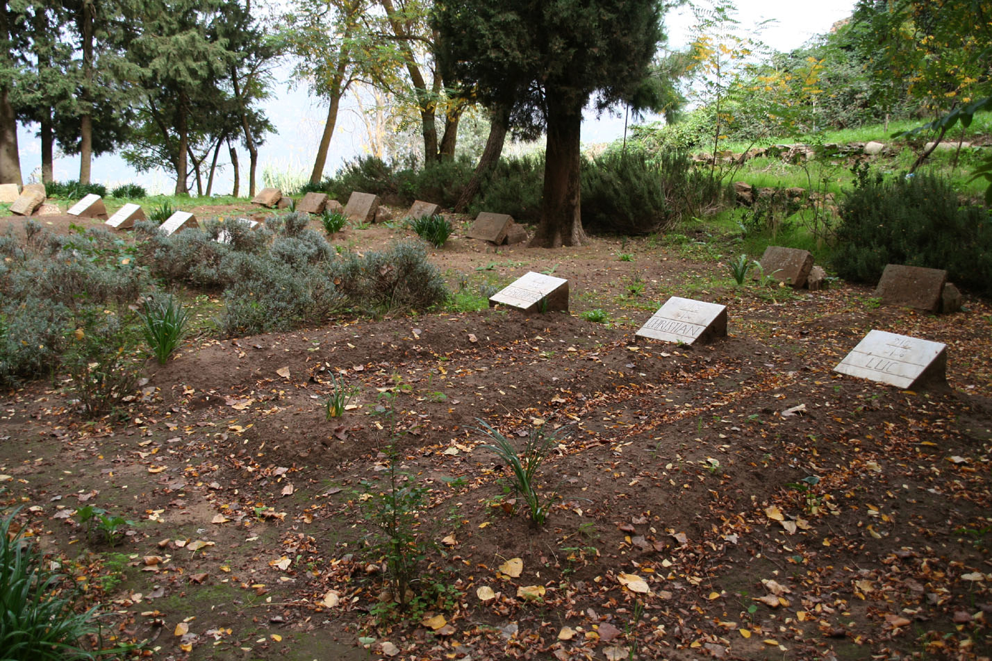 Cimetière du monastère de Tibhirine en Algérie où sont enterré les sept moines assassinés en 1996.